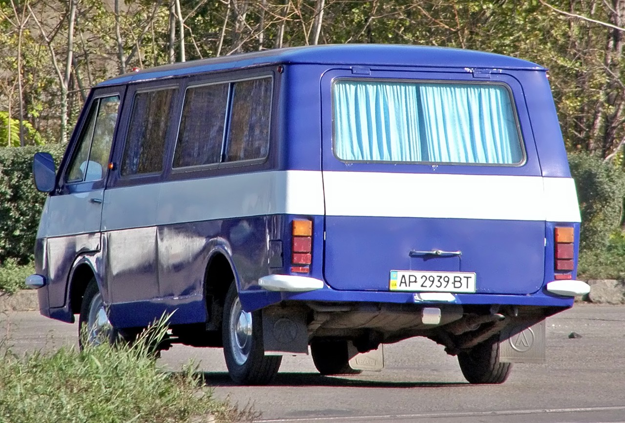 Автомобиль Службы Безопасности Движения города Запорожье